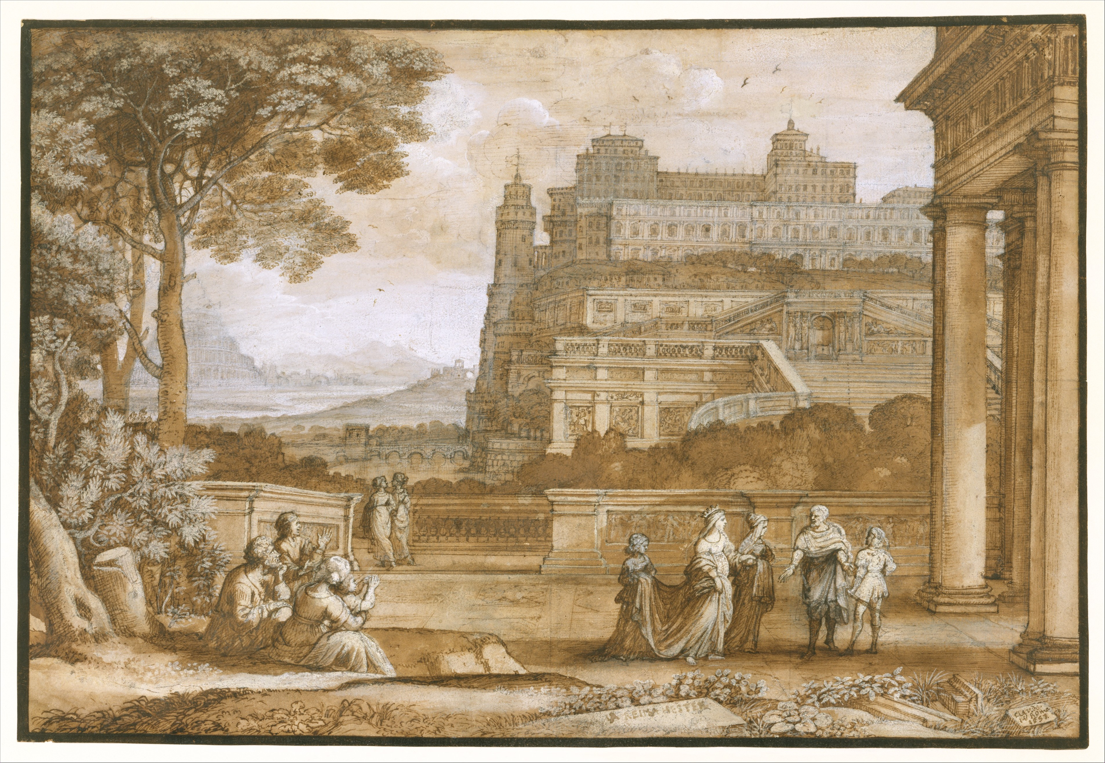 Drawing; Drawings